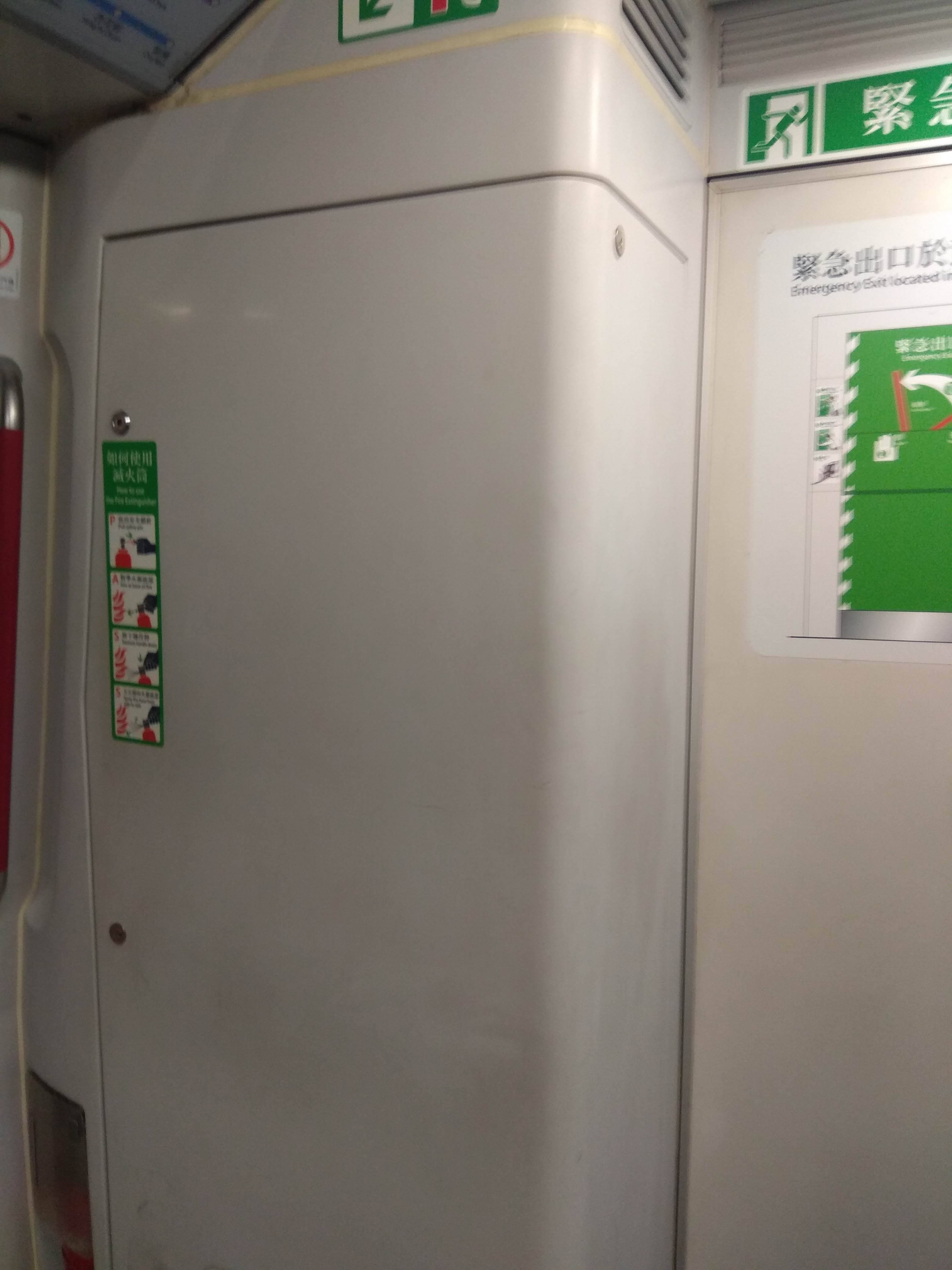 中文（香港）: A110的新訊號系統櫃